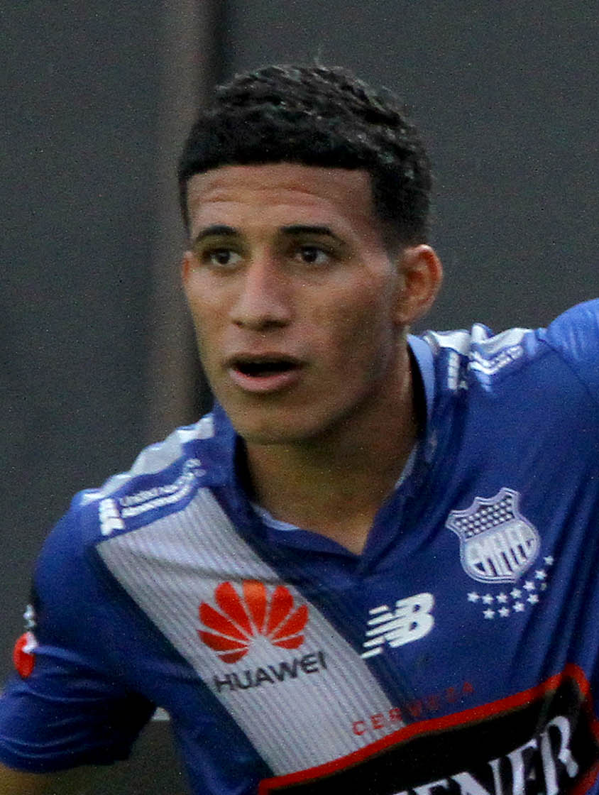 Guayaquil, Miércoles 18 de marzo del 2015 (ANDES).-Emelec se enfrenta a Internacional de Brasil por la Copa Libertadores Foto:César Muñoz/ANDES